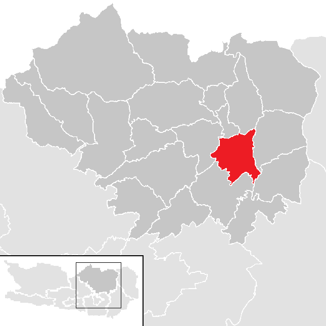 Bezirk Sankt Veit an der Glan